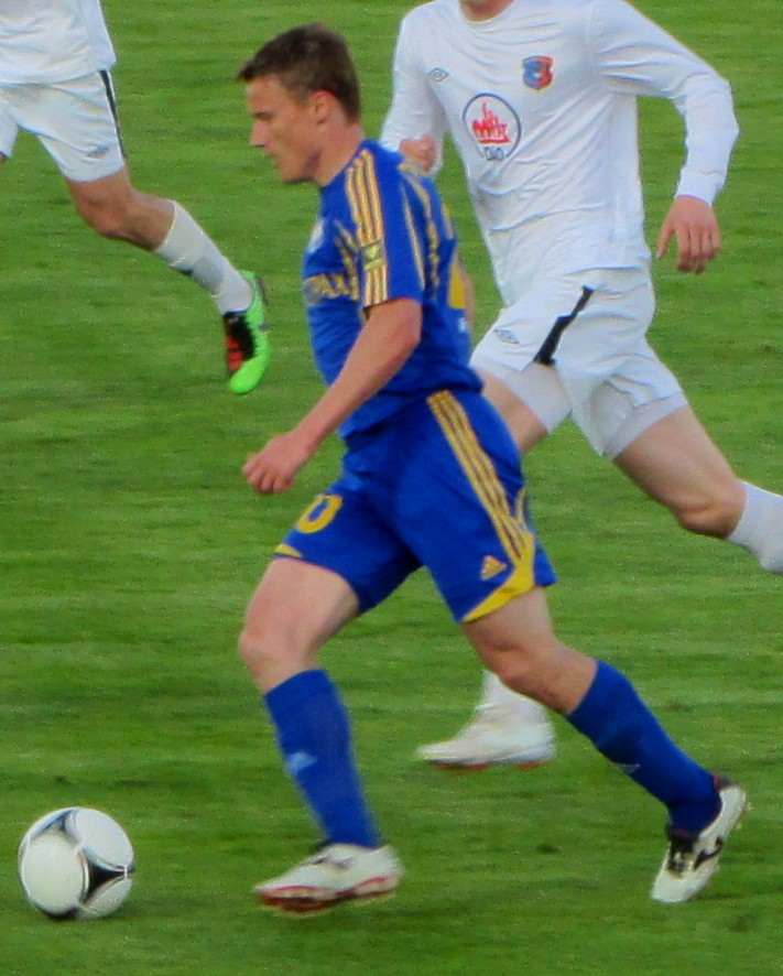 Игрок ФК БАТЭ (Борисов, Беларусь) Виталий Родионов